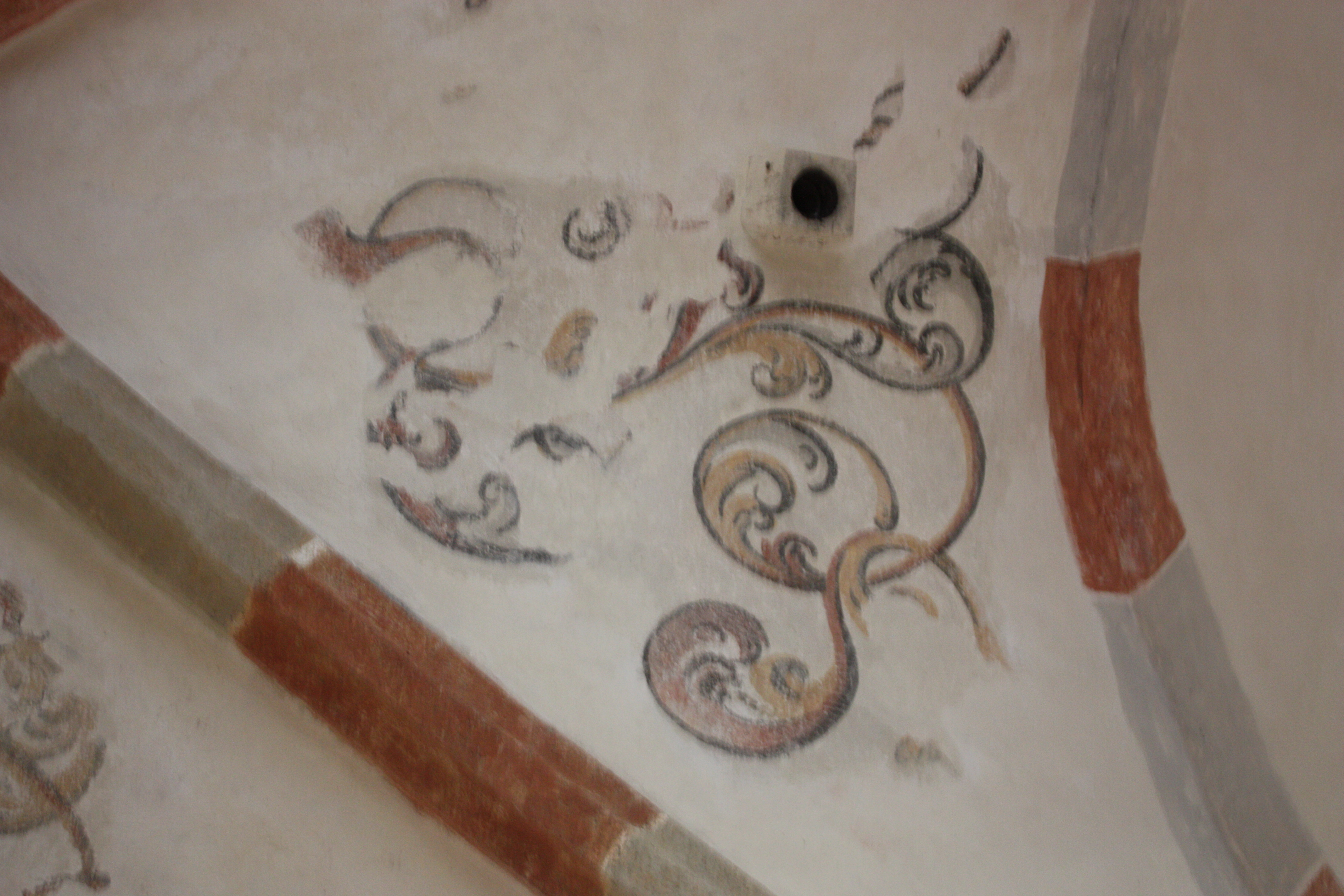 dekor